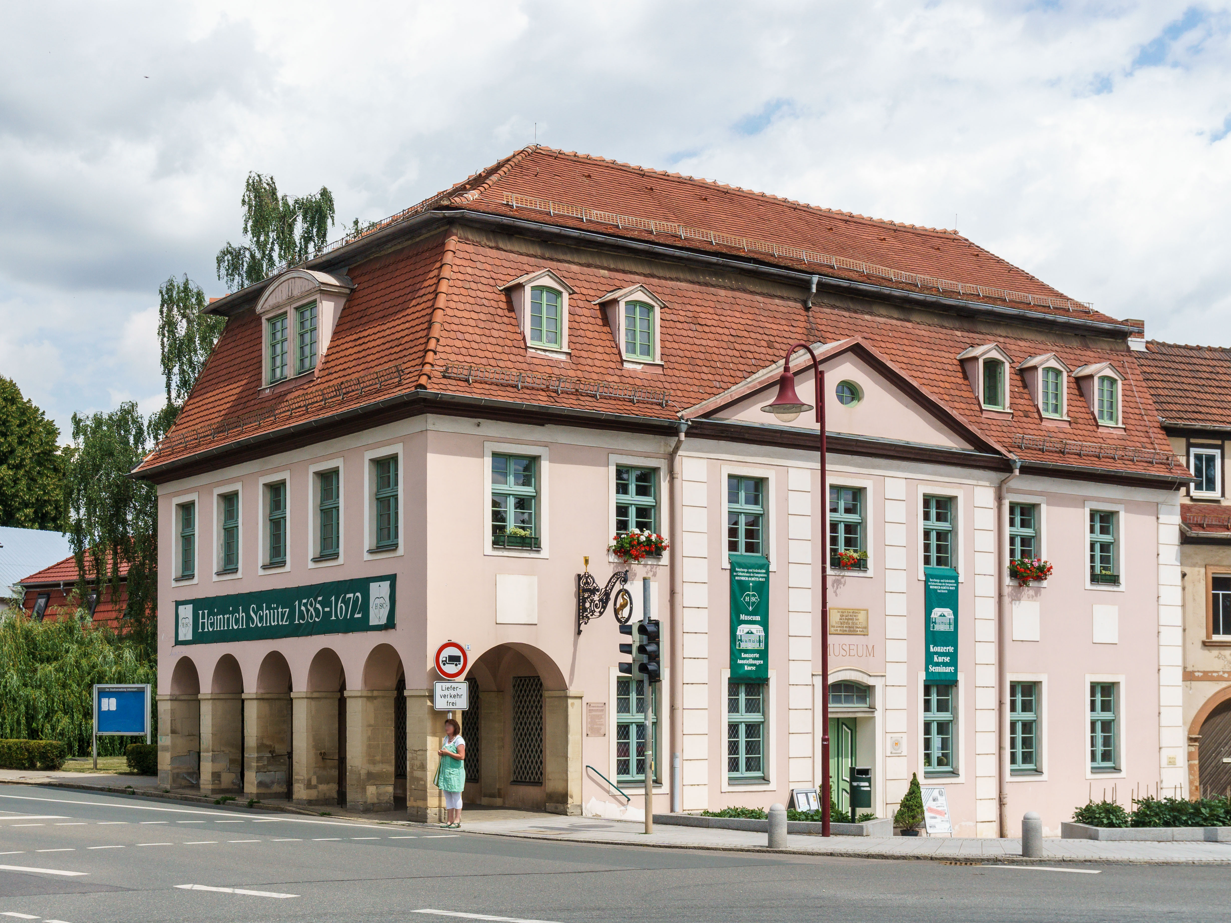 "Haus zum Kranich" (Heinrich-Schütz-Haus), Geburtshaus des Komponisten Heinrich Schütz in Bad Köstritz.